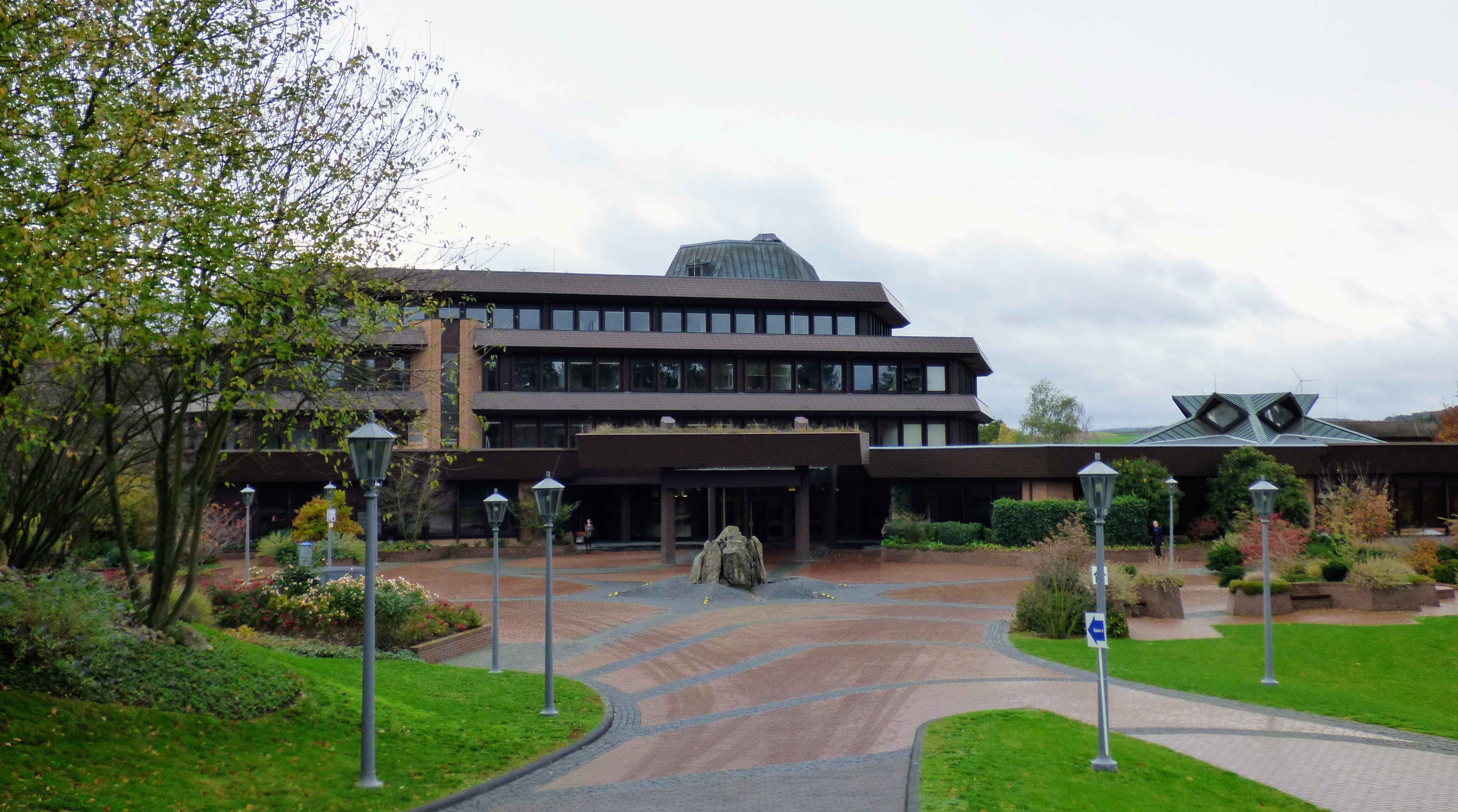 Bethel Selters, Deutschland